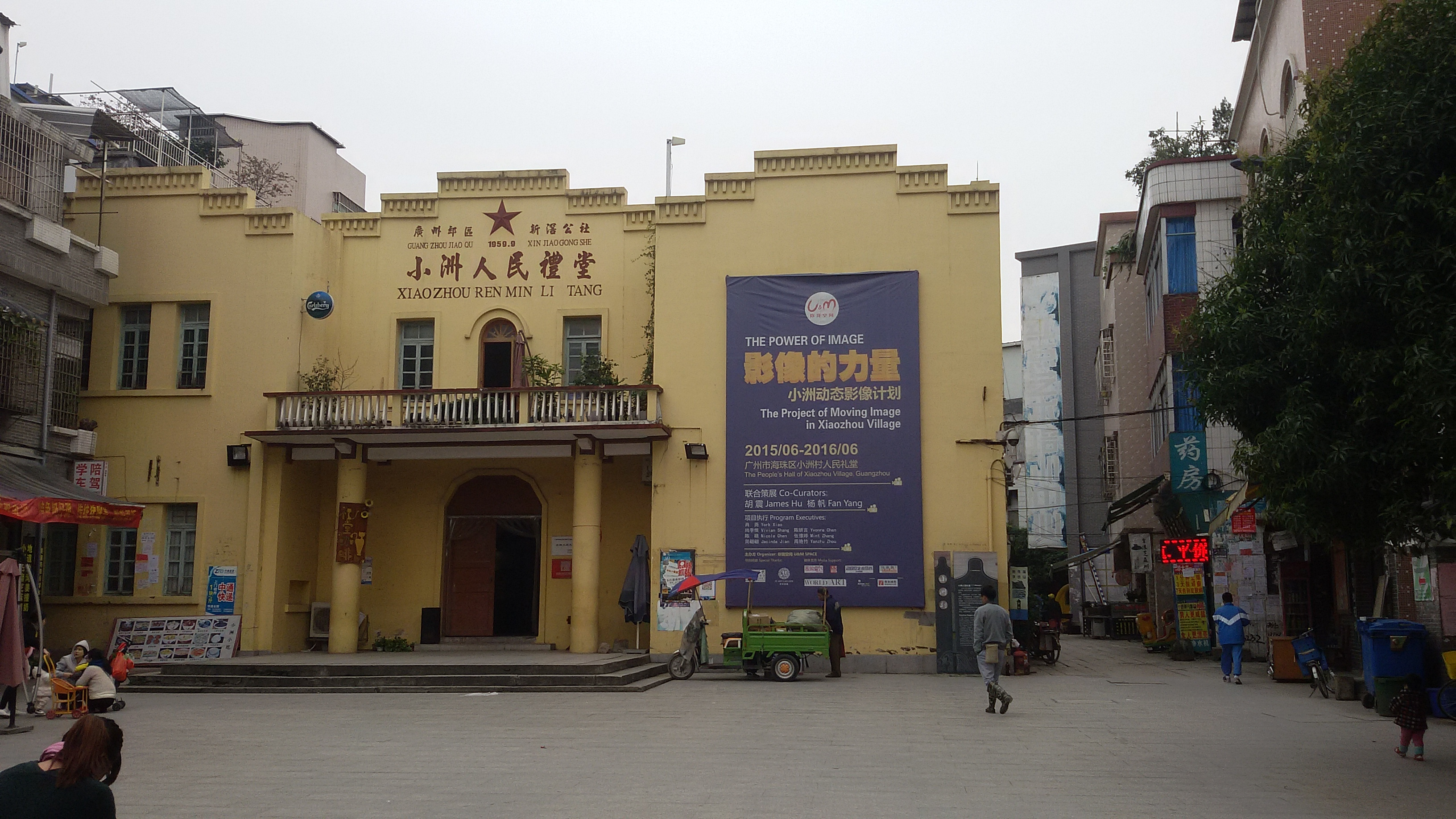 粵語: 小洲人民禮堂